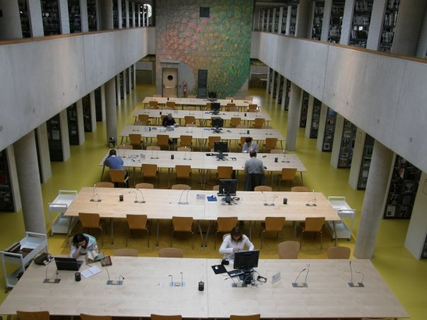 čítárna Studijní a vědecké knihovny v Hradci Králové